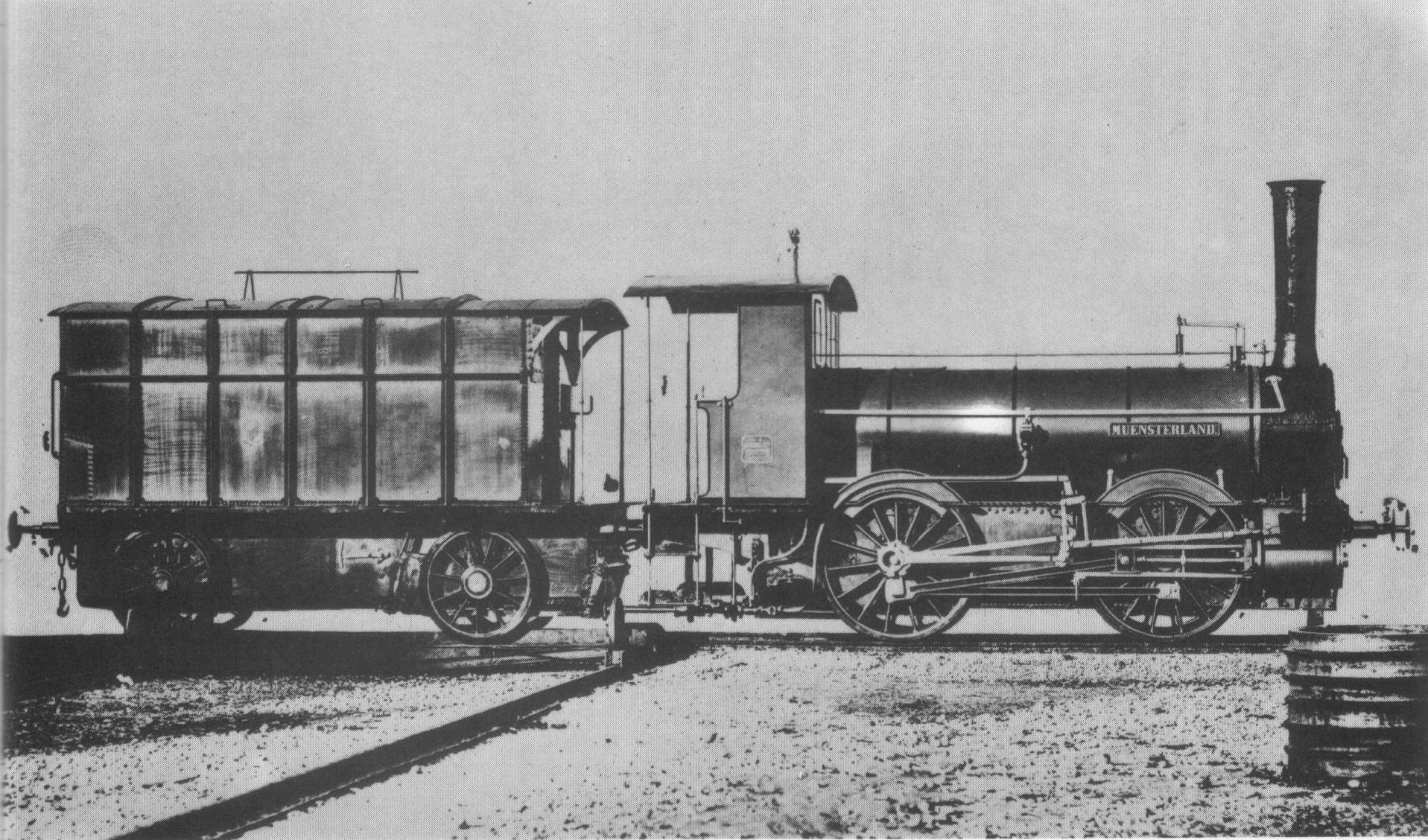 Dampflokomotive Oldenburgische G 1.